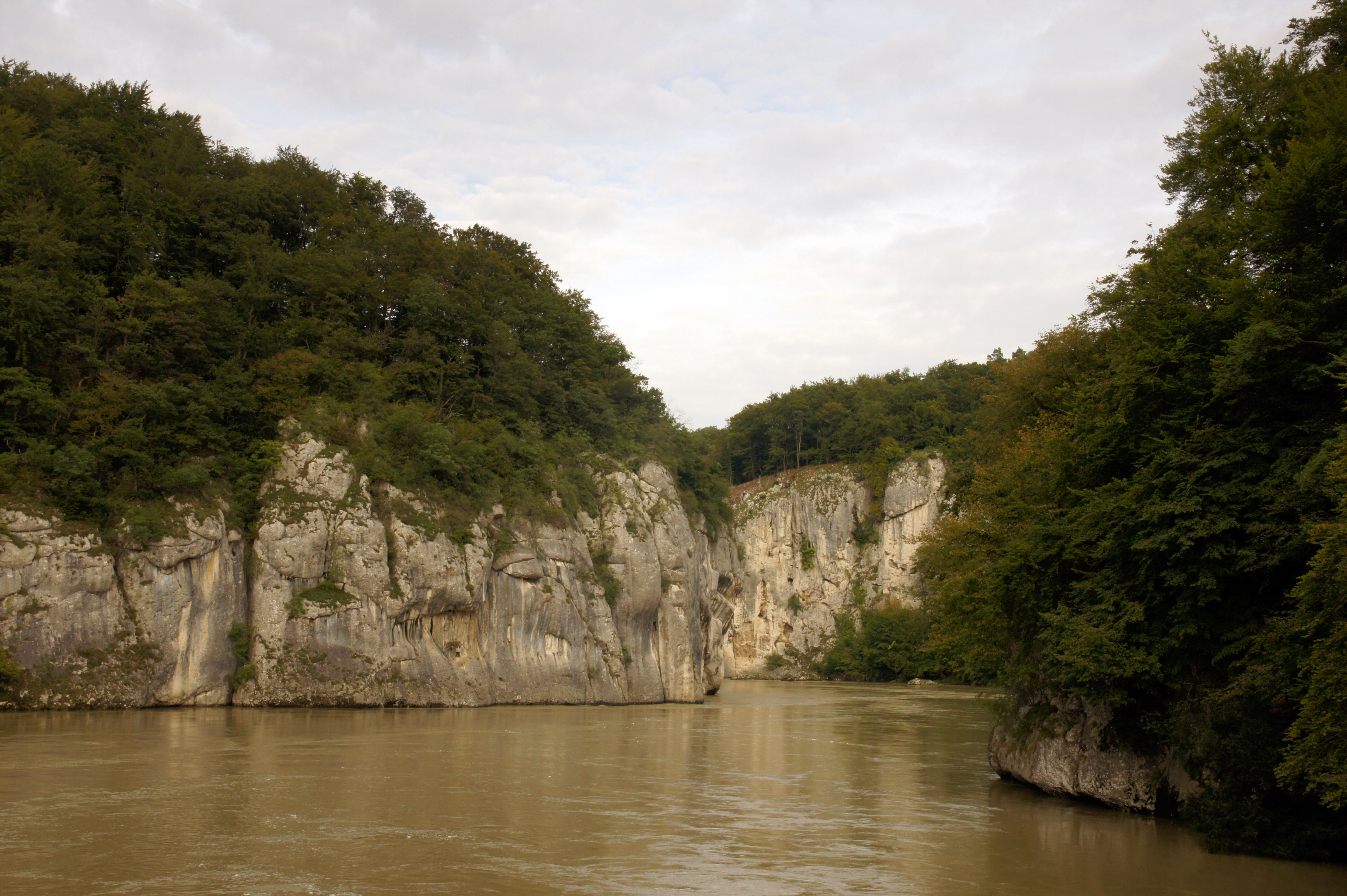 Der Donaudurchbruch bei Kelheim.